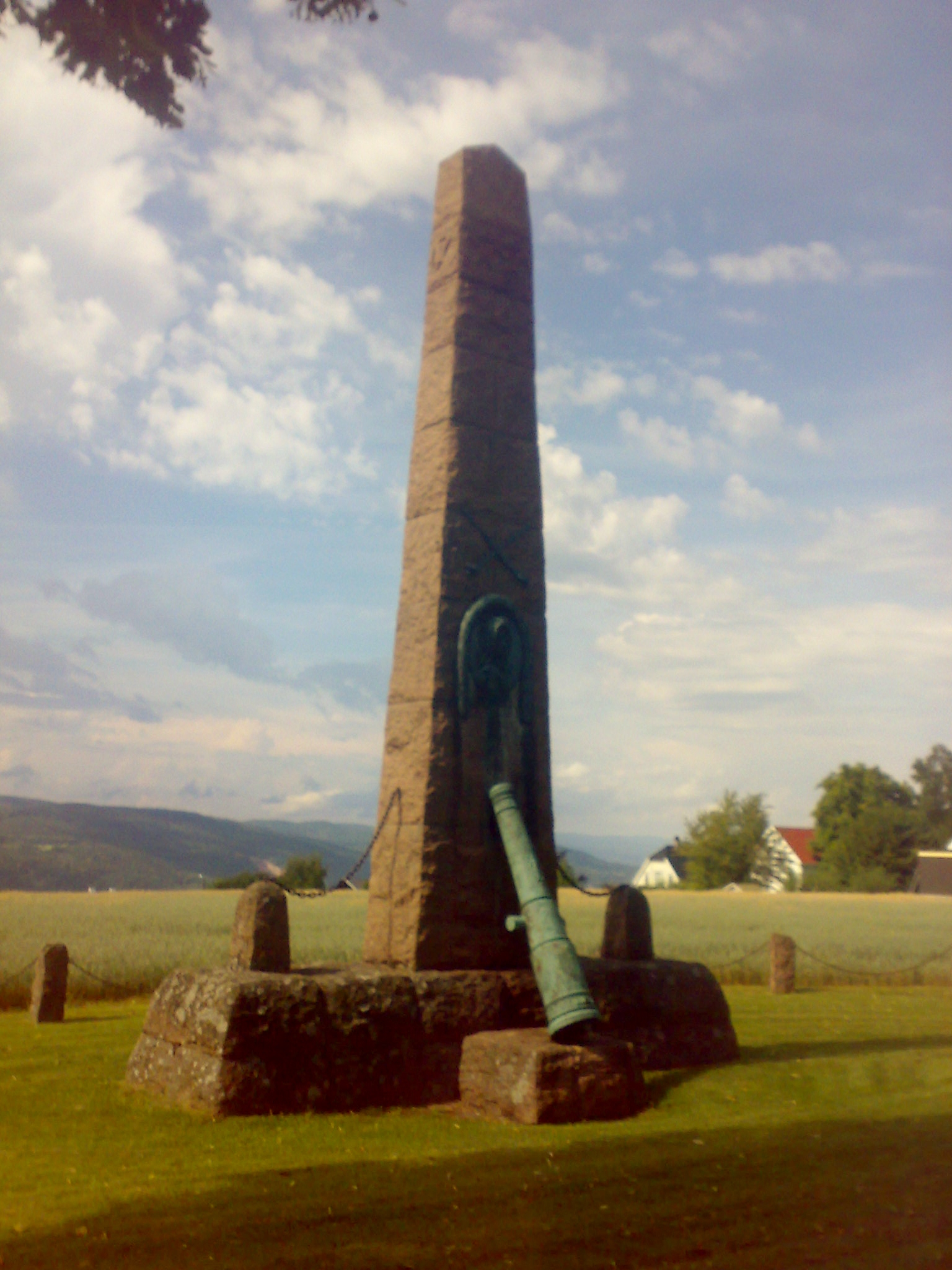 Grave murial outside Hurum church in Klokkarstua village, Hurum, Buskerud (Norway)